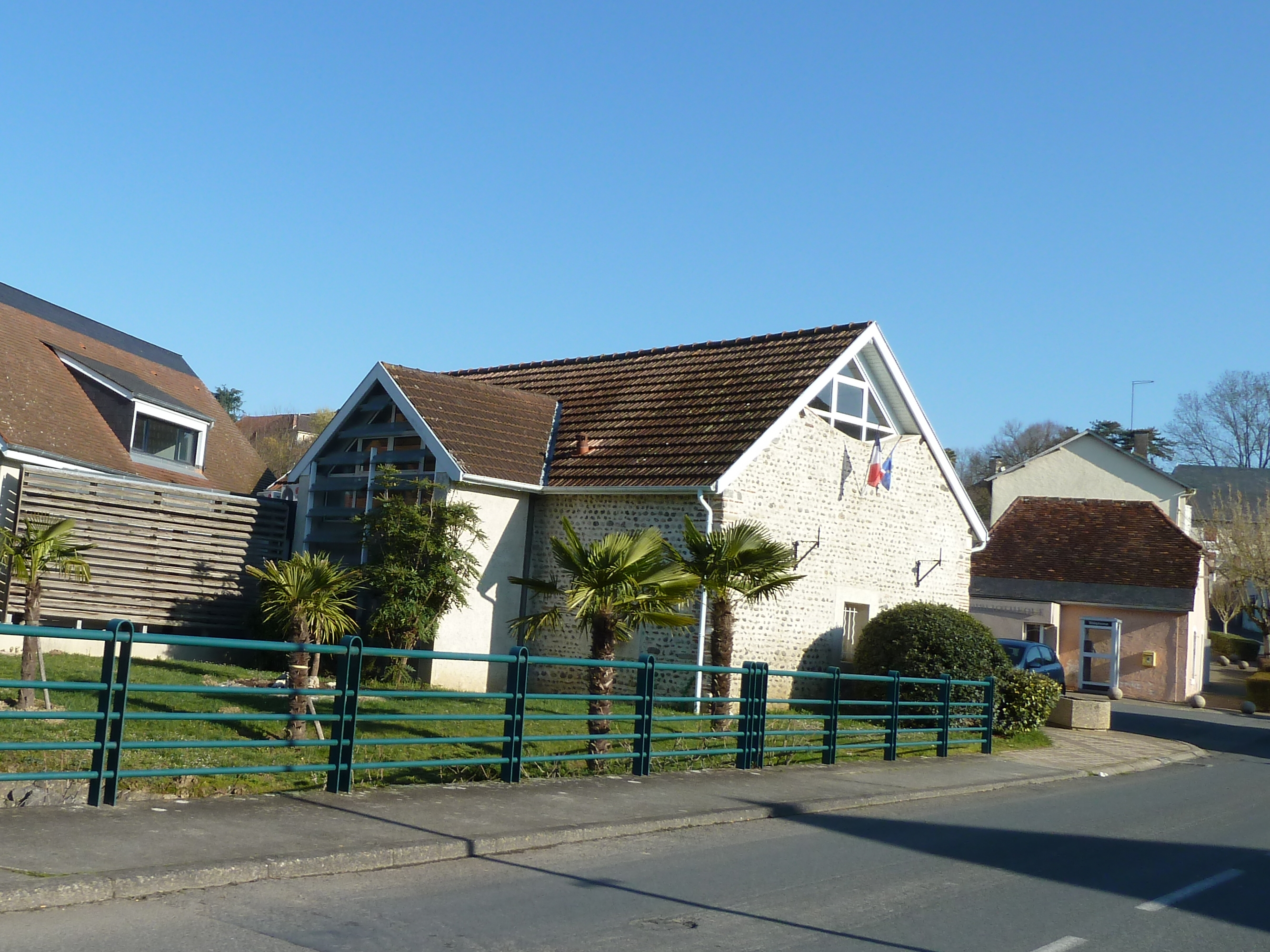 Mairie de Poey-de-Lescar